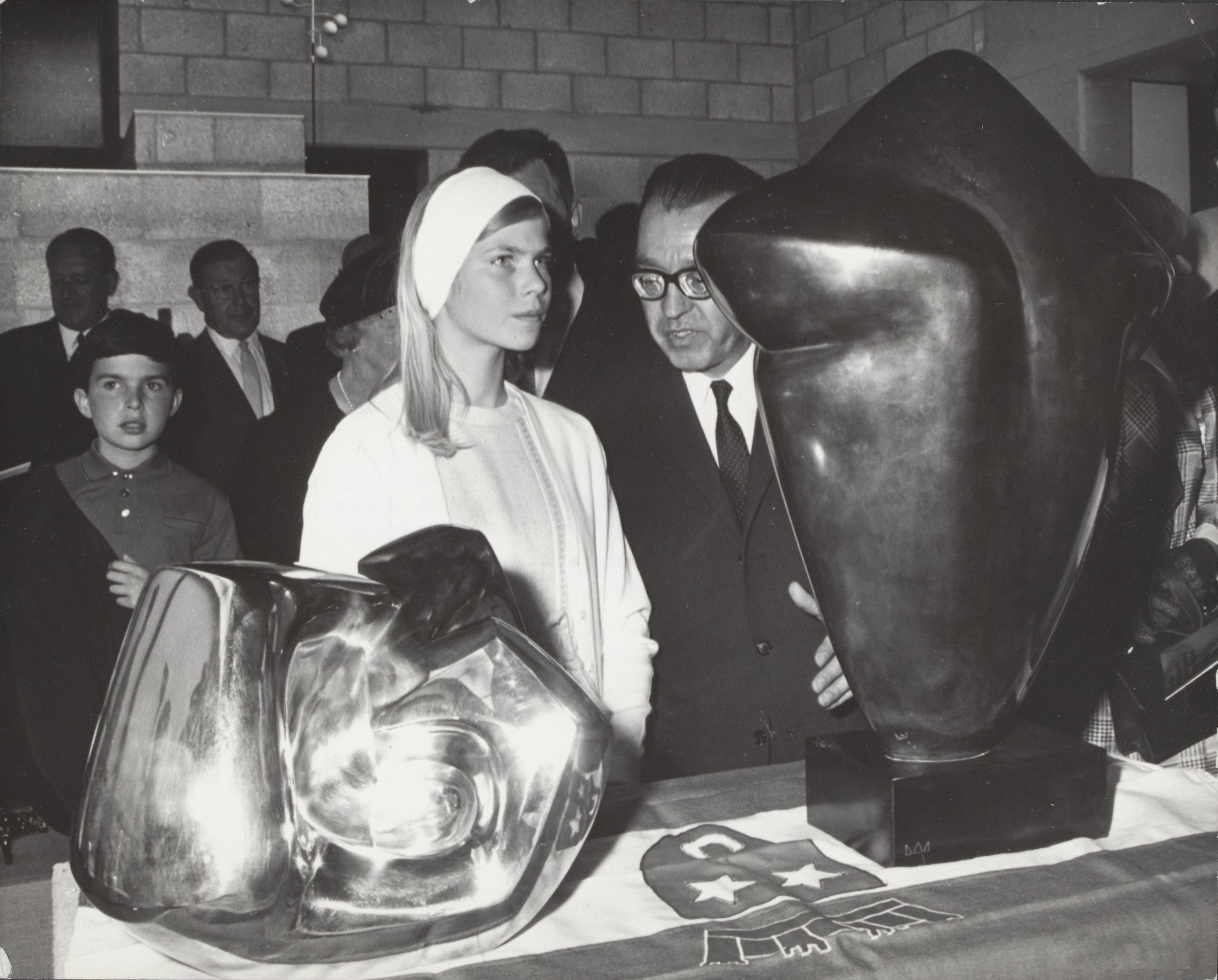 Collectie / Archief : Fotocollectie Elsevier Reportage / Serie : [ onbekend ] Beschrijving : Prinses Marie Astrid van Luxemburg opent de Benelux-tentoonstelling. Bij de twee winnende plastieken. Links "Gekronkelde Vorm" van J.P. Ghijsels, rechts "L'externel Feminin" van L. Wercelier Datum : 6 1968 Fotograaf : Kroon, Ron / Anefo Auteursrechthebbende : Nationaal Archief Materiaalsoort : Foto (zwart/wit) Nummer archiefinventaris : bekijk toegang 2.24.05.02 Bestanddeelnummer : 111-0997